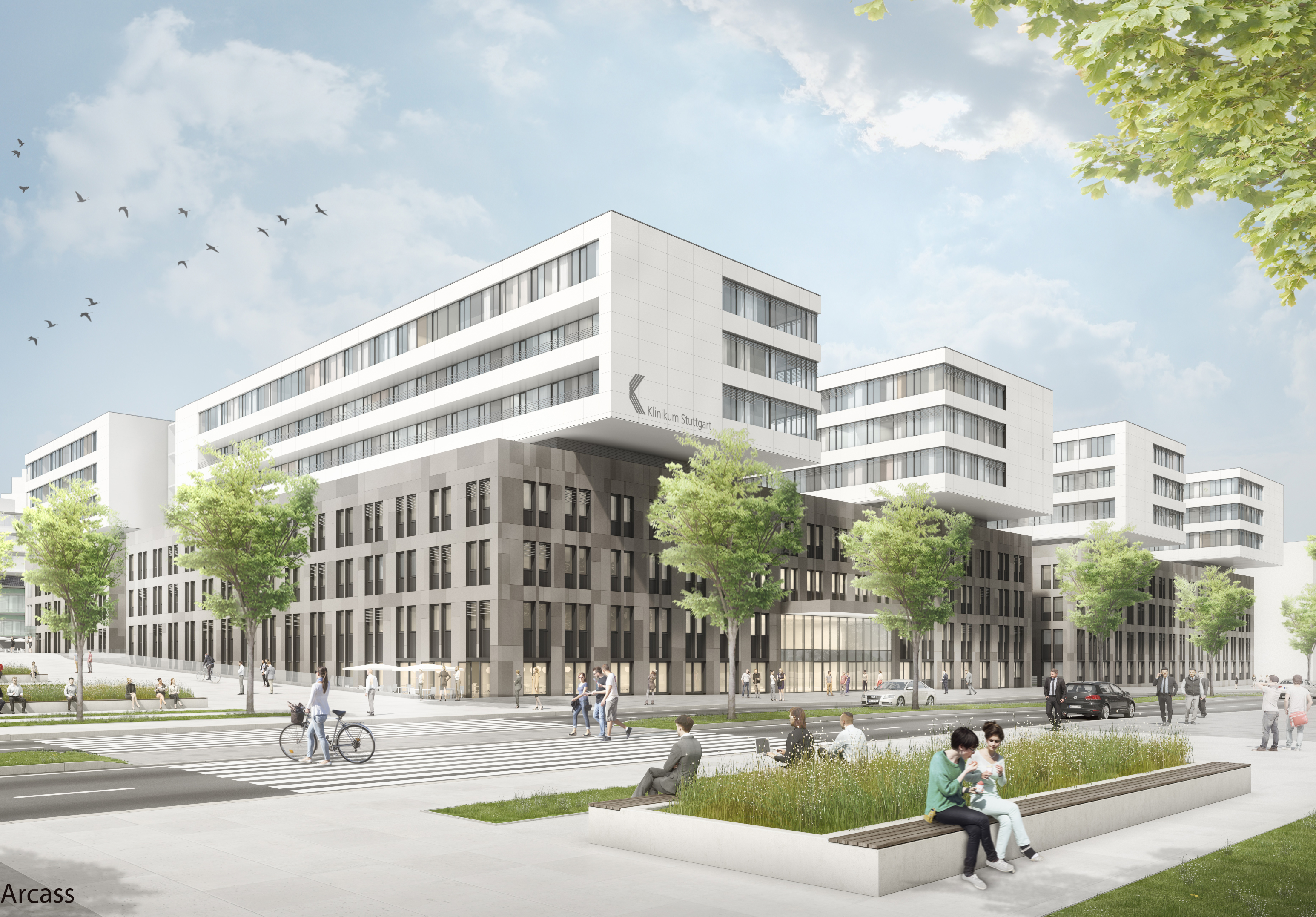 Ansicht des zukünftigen Katharinenhospitals